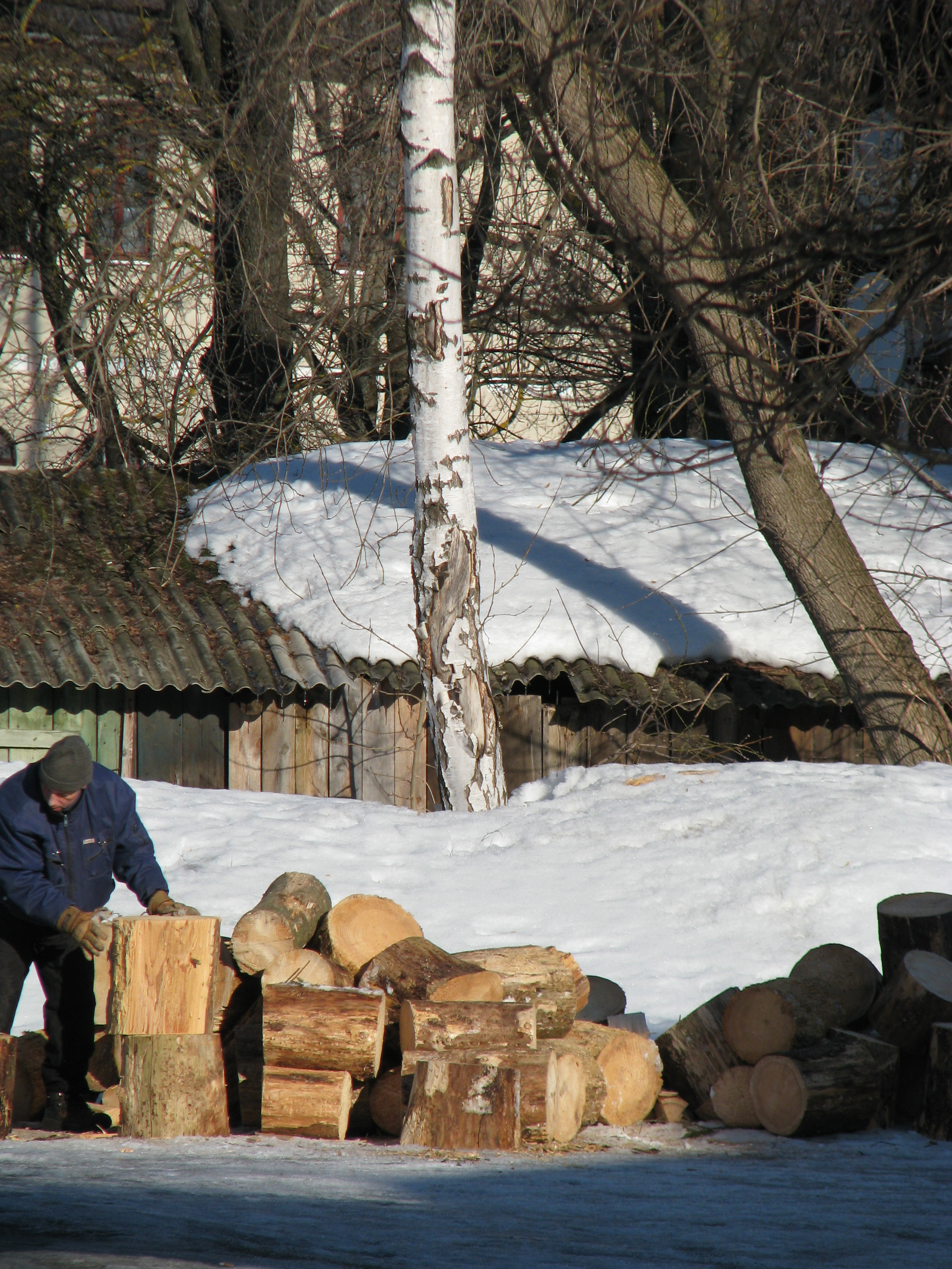 Küttepuude varumine Tartus, Vaksali linnaosas